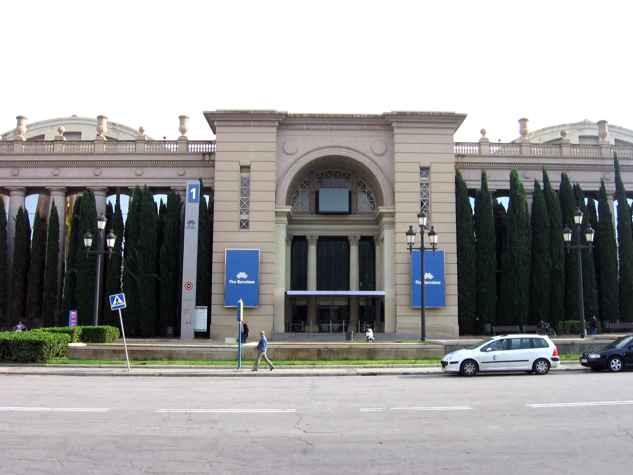 Palacio de Comunicaciones, Montjuïc (Barcelona)